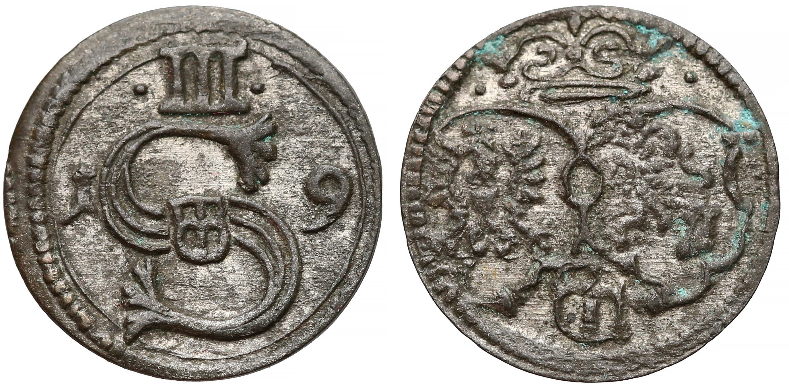 Trzeciak koronny 1619 Poznań